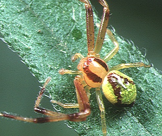 male Ebrechtella tricuspidata from Okinawa.